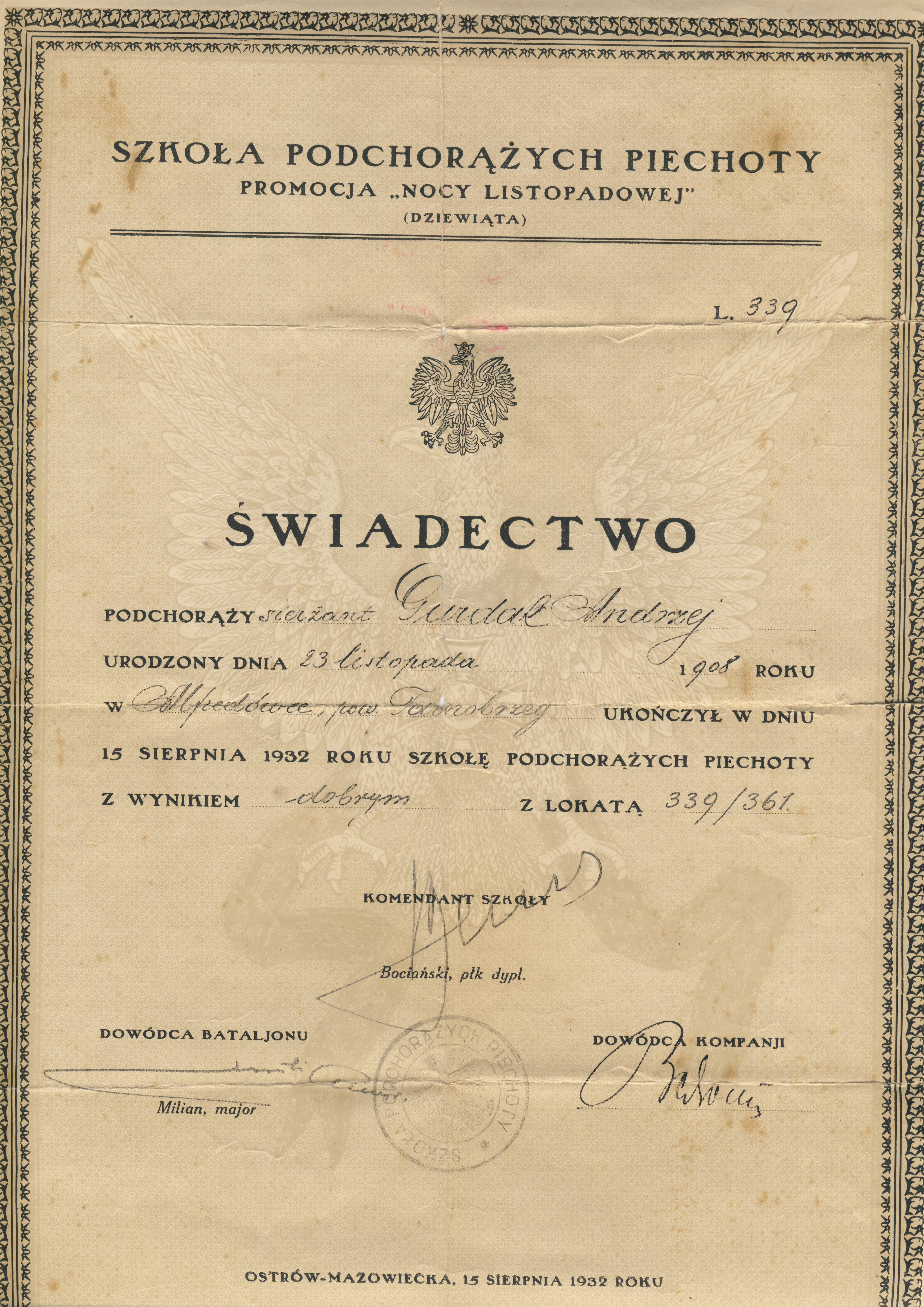 Świadectwo ukończenia szkoły oficerskiej Andrzej Gurdak